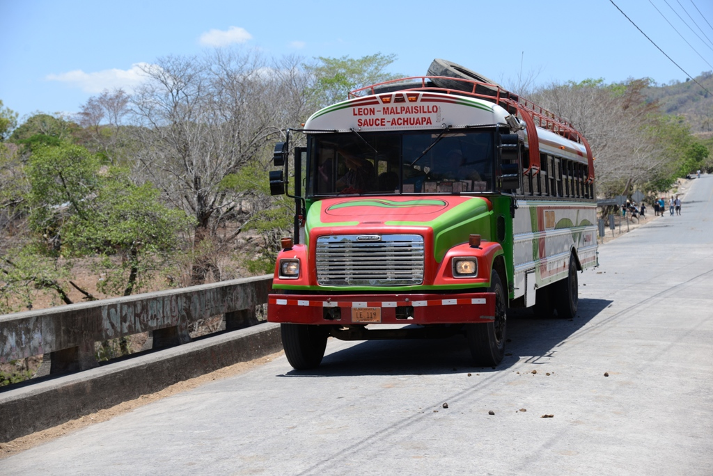 El bus de León a Achuapa pasa por el puente de Rio Grande.